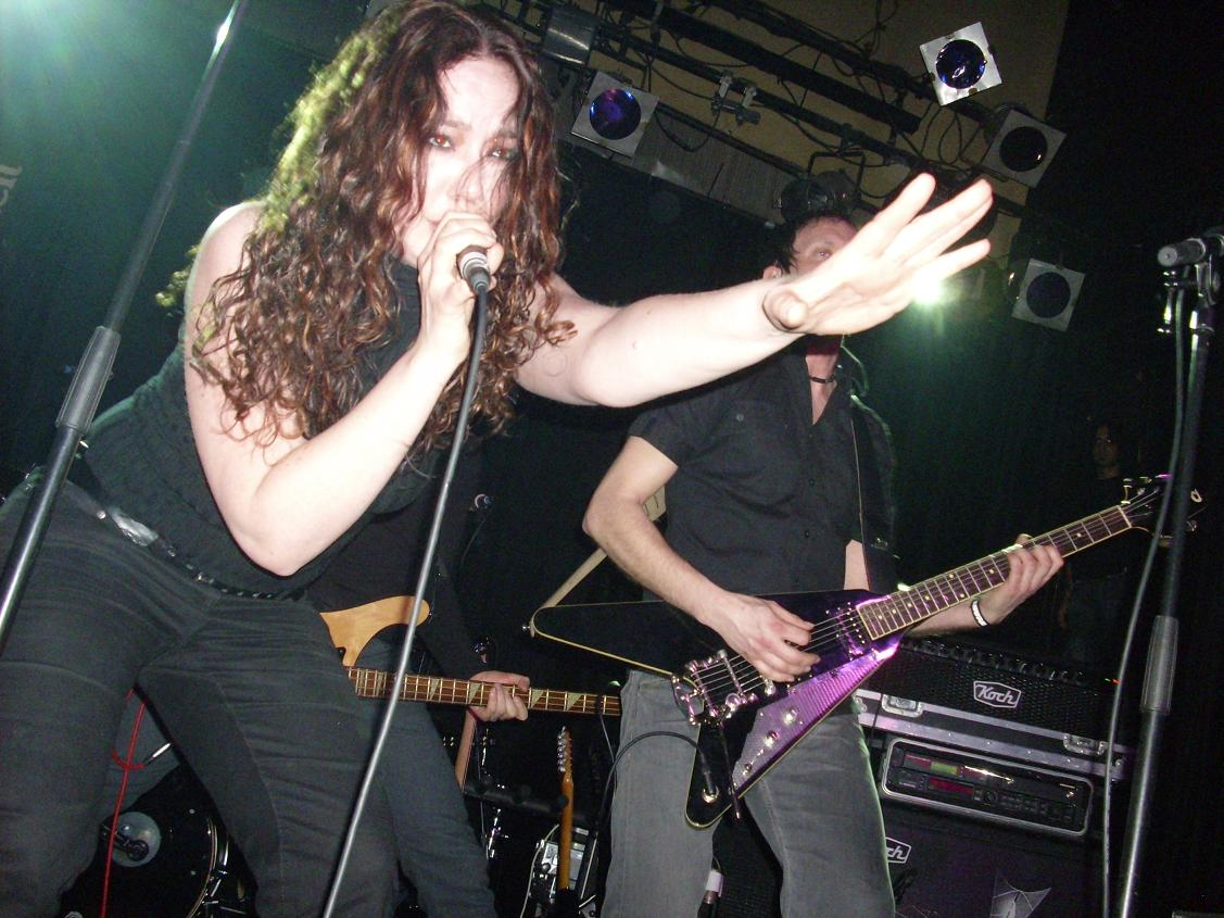 Autumn (Dutch band). Sala Heineken Madrid , 7 Febrero 2010